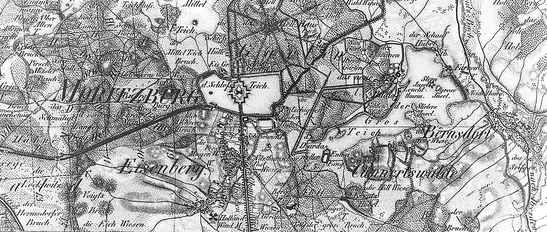 Original image description from the Deutsche Fotothek Moritzburg-Radeburg-Bärnsdorf. Ausschnitt aus: Oberreit, Sect. Großenhain, 1841/43